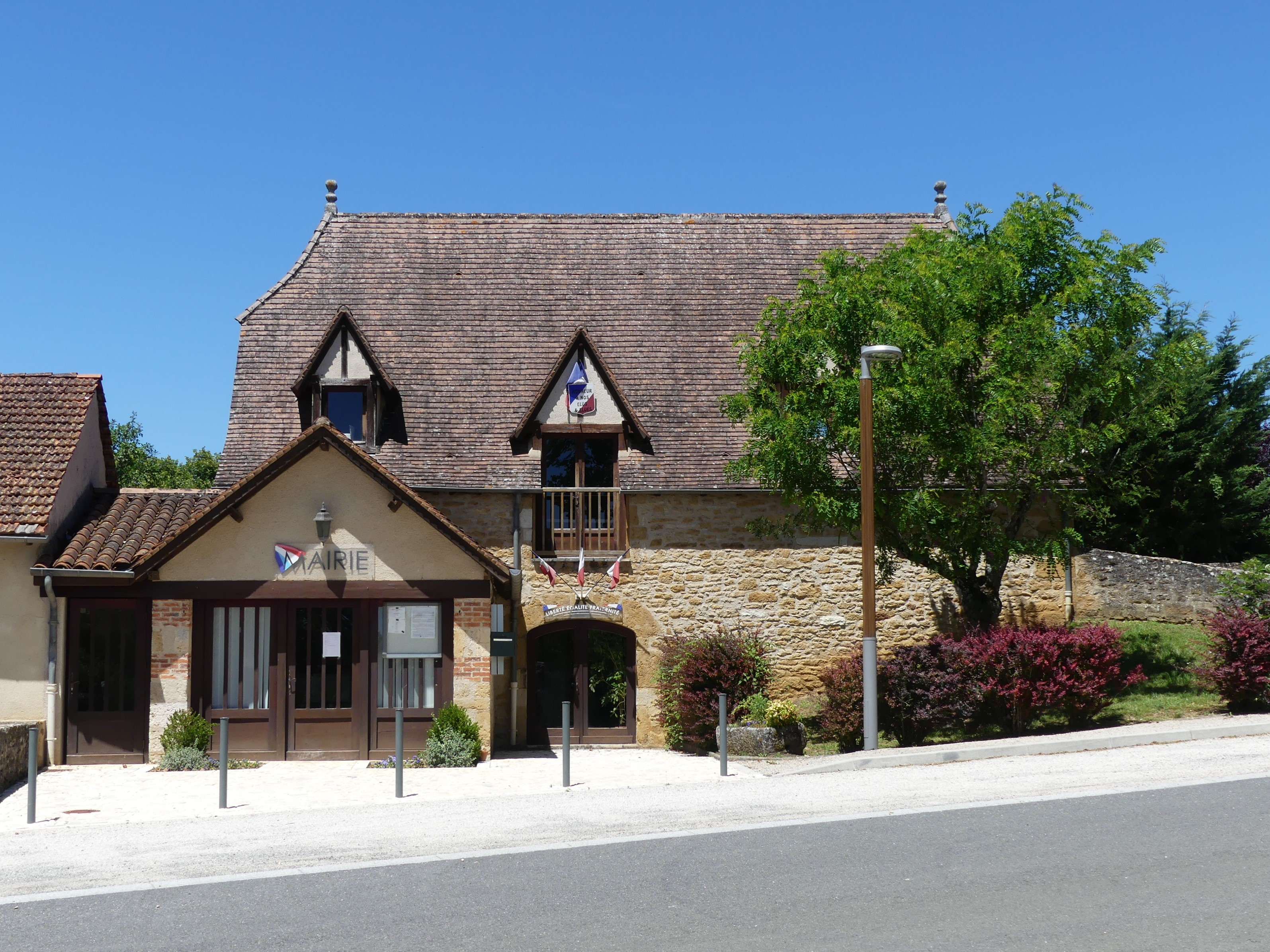 La mairie de Cambes, Lot, France.